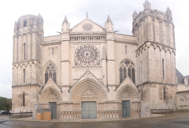 Panoramique Cathédrale Saint-Pierre